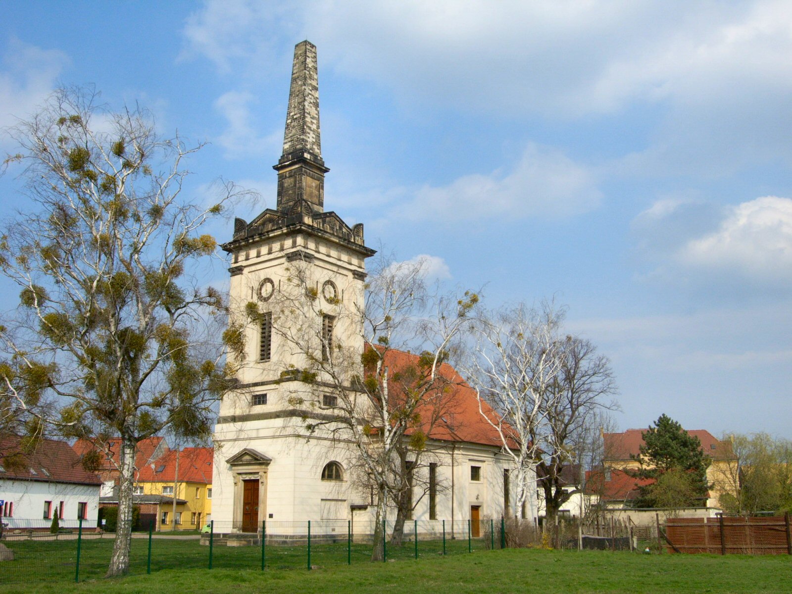 St.Bartholomäi Kirche in Dessau-Waldersee,ehemals Jonitz